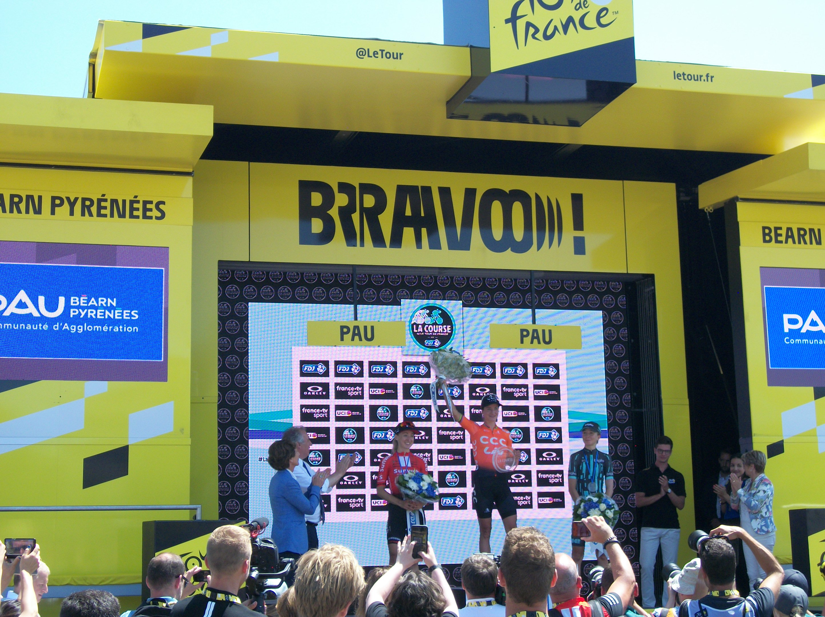 Podium de La course by Le Tour de France 2019 à Pau ː 1er ː Marianne Vos, 2ième ː Leah Kirchmann, 3ième Cecilie Uttrup Ludwig